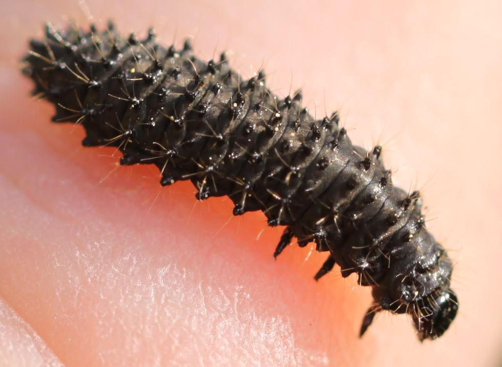 Ausgewachsene Larve des Rainfarn-Blattkäfers (Galeruca tanaceti)